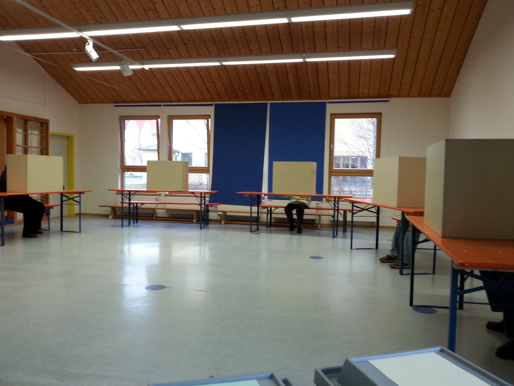 Wahllokal bei der Kommunalwahl in Bayern 2014